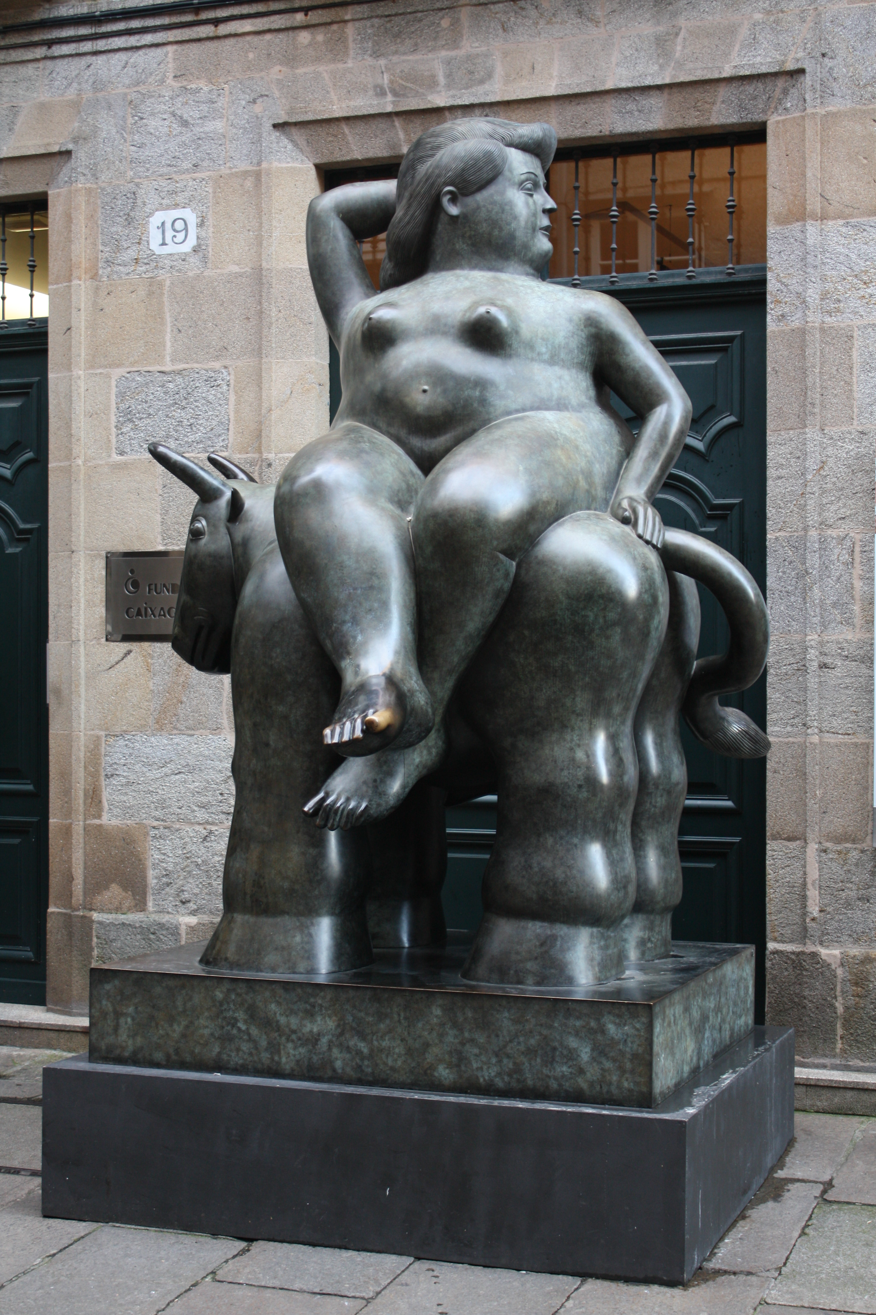 O rapto de Europa (Fernando Botero, 1992). A estatua exponse na terminal T1 de Barajas, pero a fotografía corresponde á presentación dunha exposición dos fondos de AENA en Santiago de Compostela (2011), para a que se colocou a escultura na rúa do Vilar.